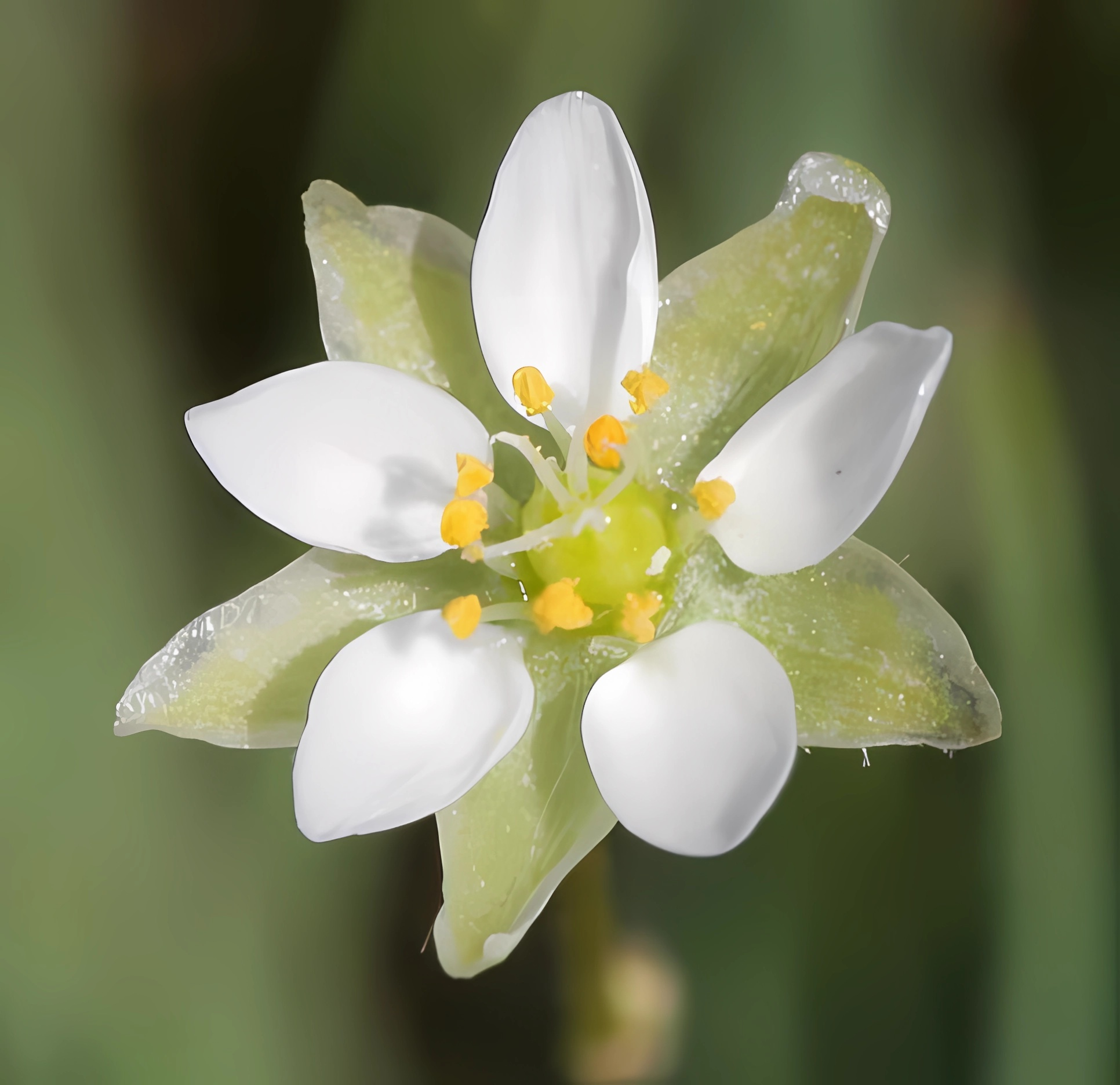 Frühlings-Spergel (Spergula morisonii)